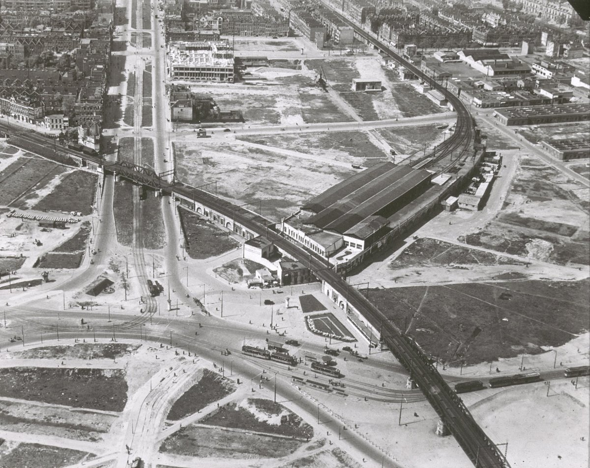 Exterieur LUCHTFOTO (OVERZICHT NA 1940)